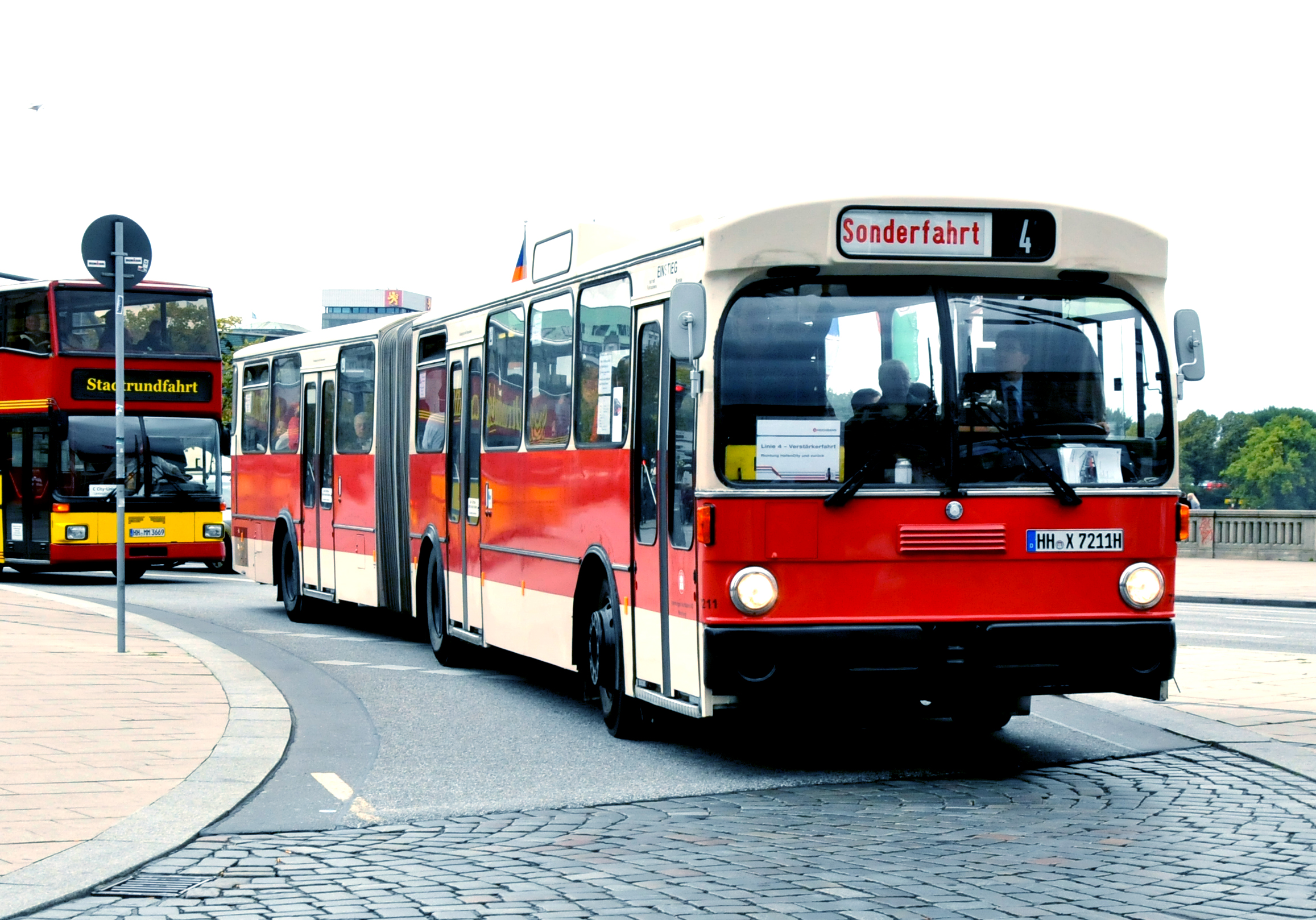 Hamburger Hochbahn-Stadtbus 7211 van het type Mercedes-Benz O305 G tijdens parade te Jungfernstieg. [1]